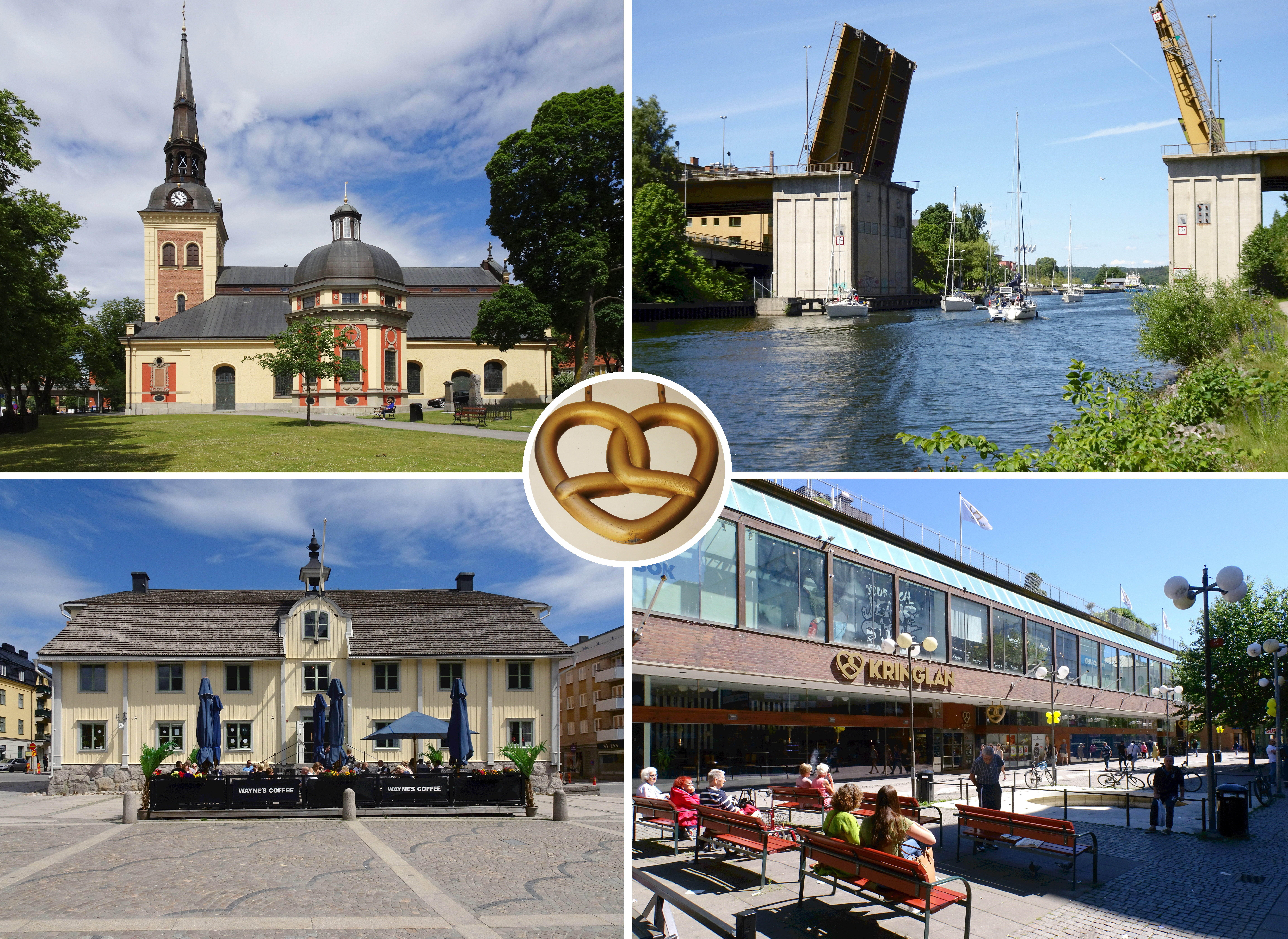 Södertälje Fotokollage: Sankta Ragnhilds kyrka Södertälje kanal och Mälarbron Södertäljes gamla rådhus Varuhuset Kringlan Kringlan